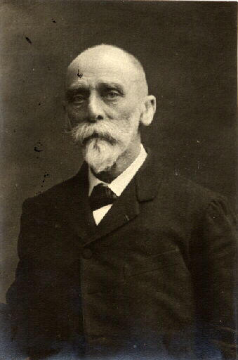 Max Bonnet (1841–1917), französischer Klassischer Philologe